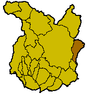 Localisation de la commune de Montale à l'intérieur de la province de Pistoia.